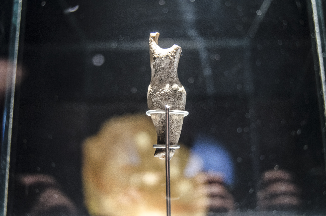 Venus de El Pendo. Colgante en asta de cérvido conocido como la Venus de El Pendo por sus gráciles formas que parecen evocar una silueta femenina. Antigüedad: más de 17 000 años. Ubicación: Museo de Arqueología y Prehistoria de Cantabria (España).